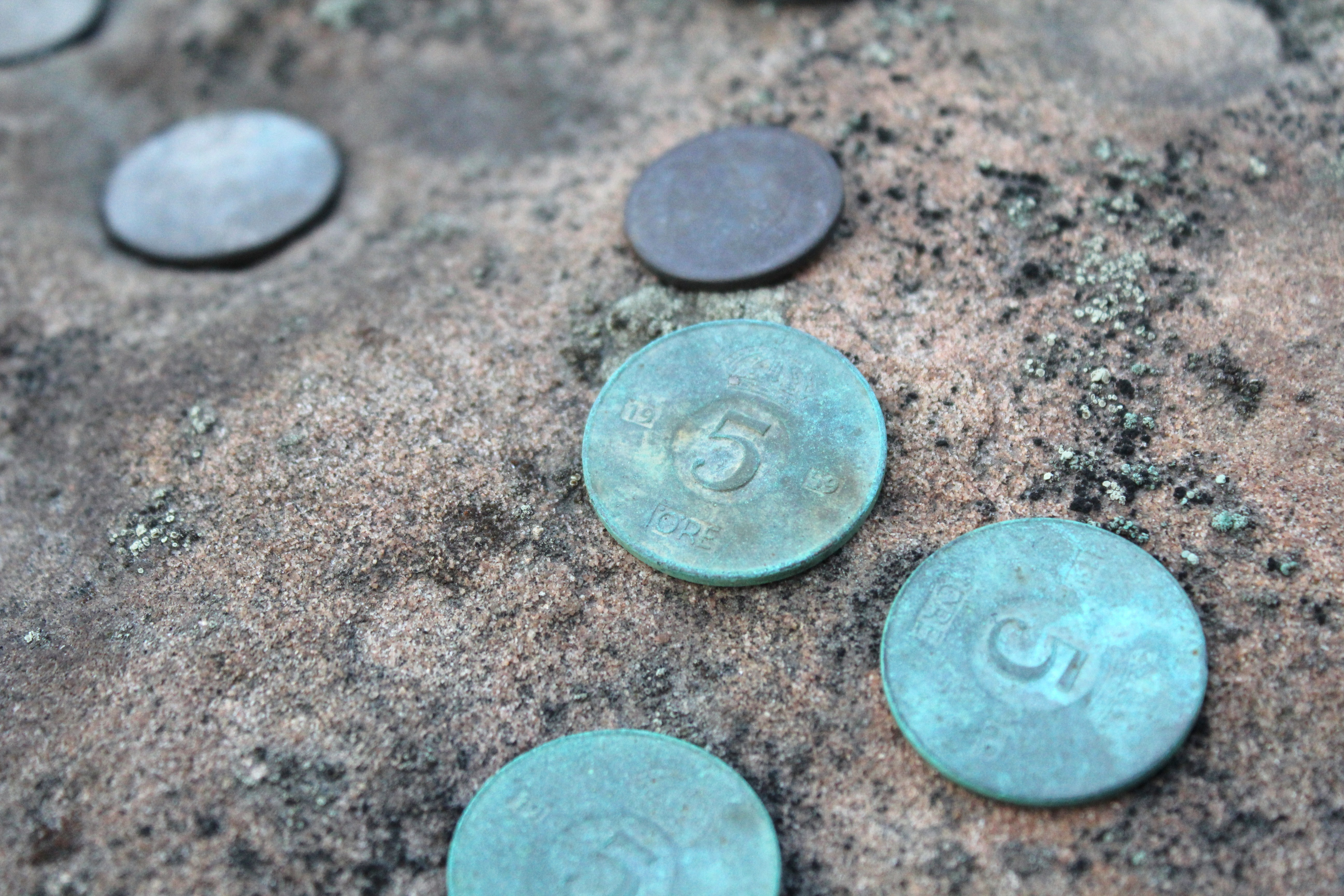 Myntbeströdd skålgropssten på en industritomt i Solberga.